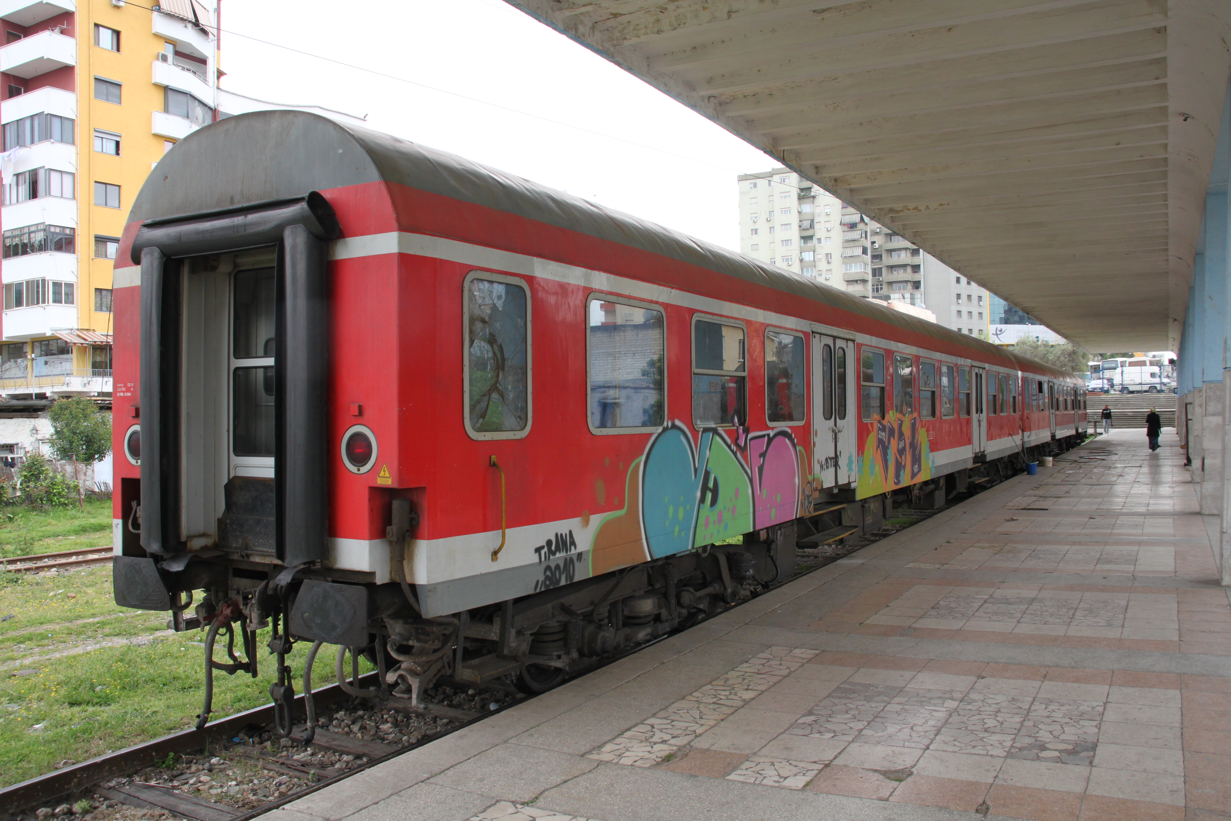 Een voormalige Duitse Silberlinge in het inmiddels voormalige station van Tirana.